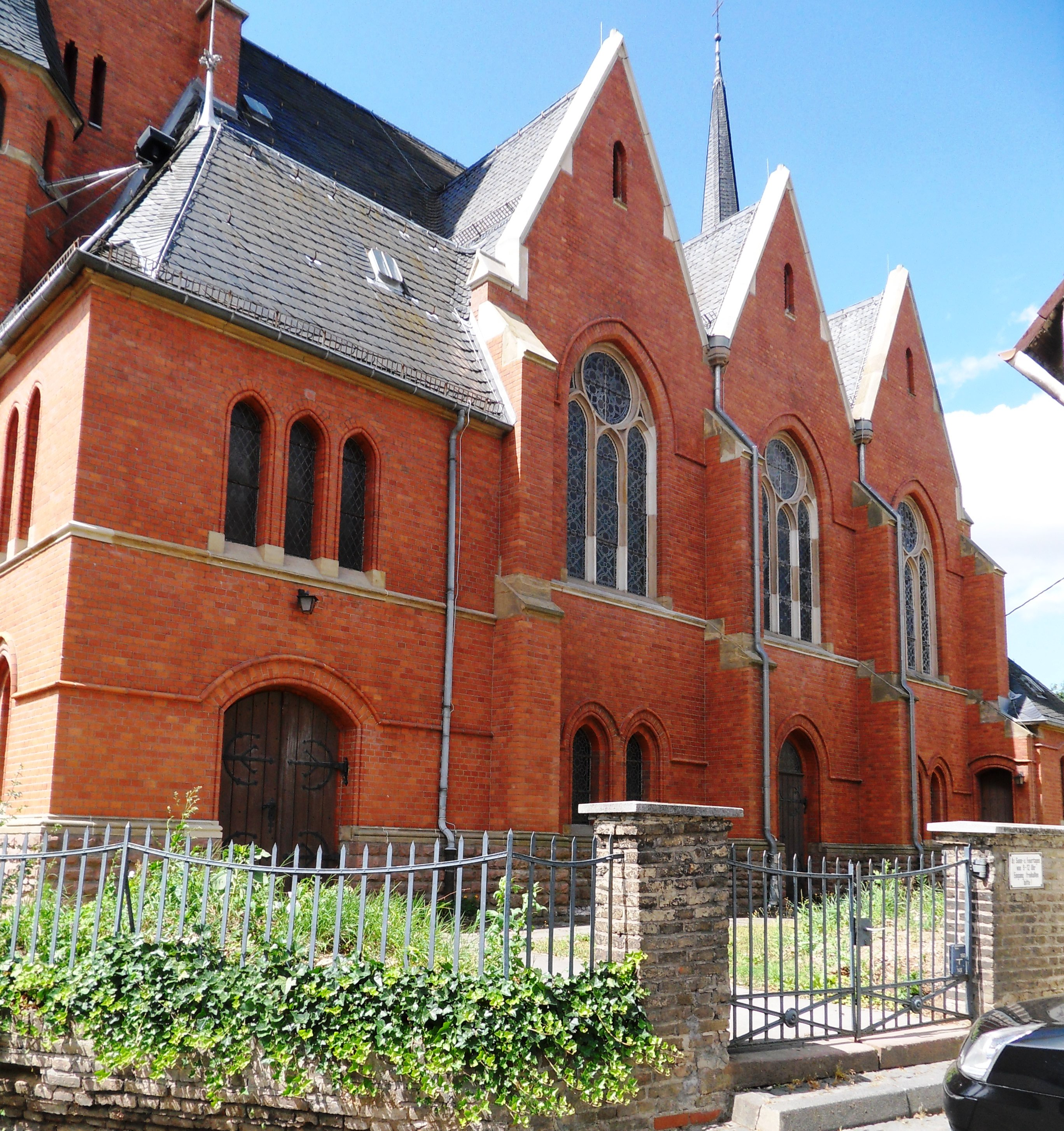 Nordfassade der evangelischen Kirche von Delkenheim